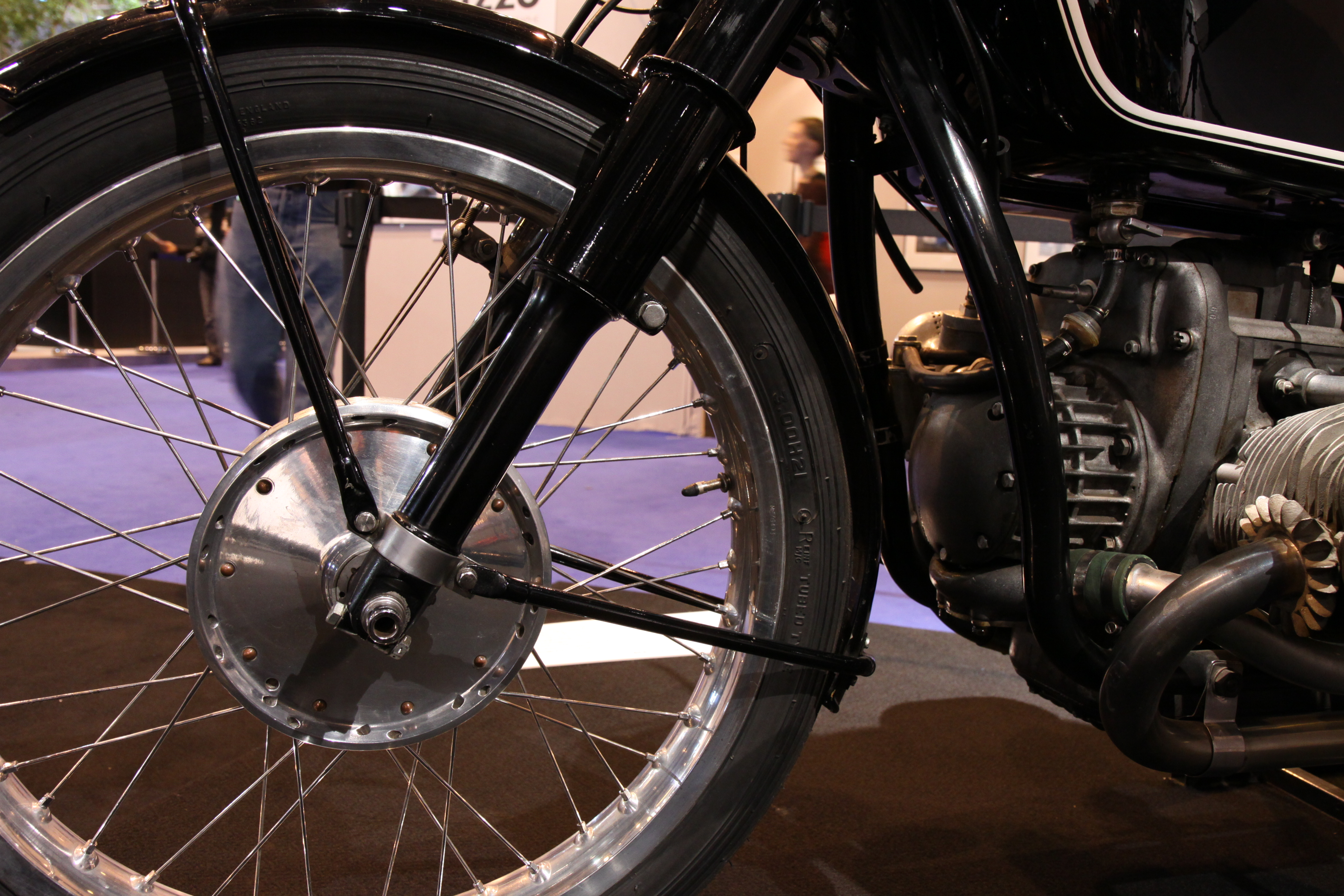 Détail de la roue avant.